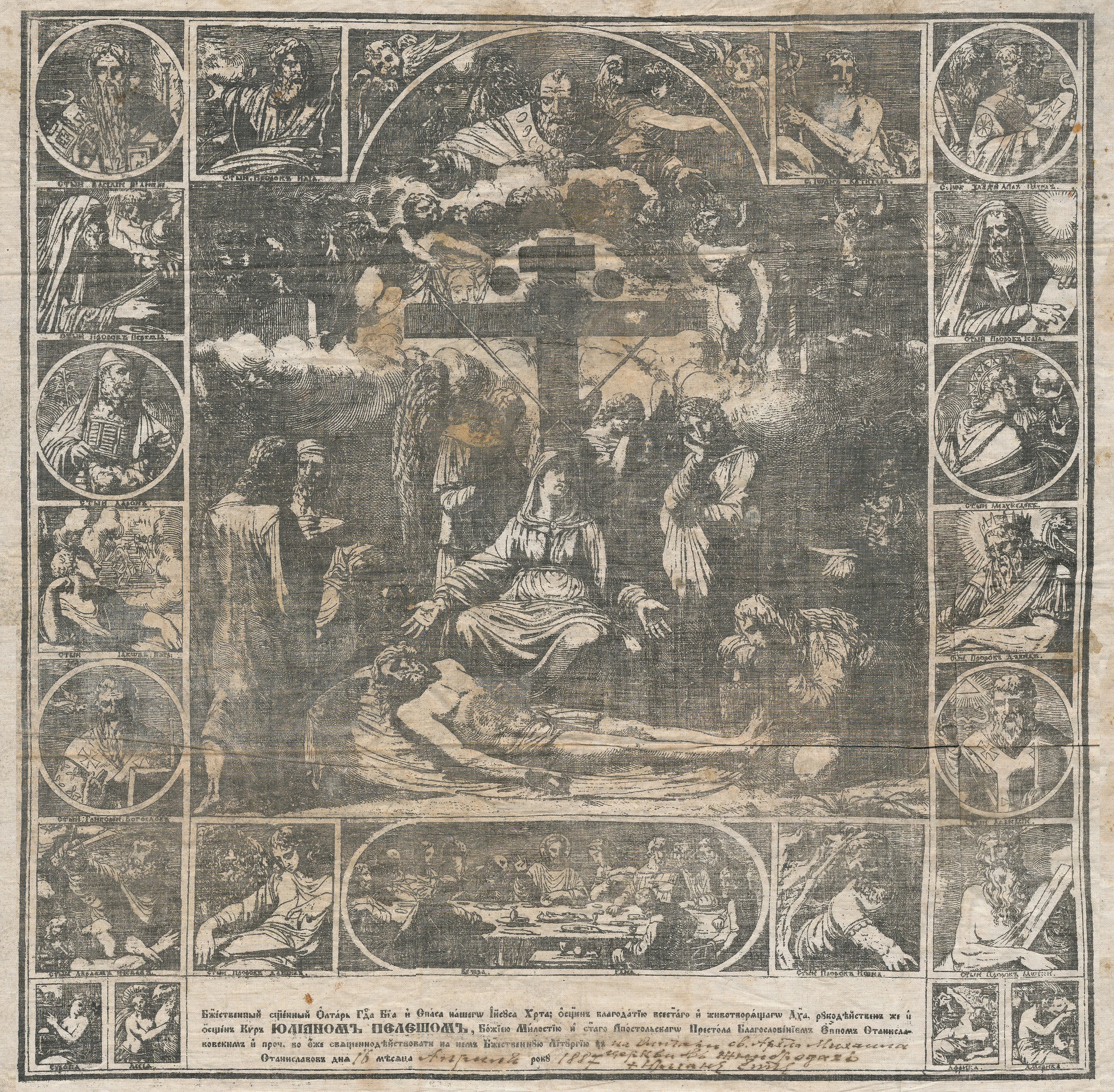 Антимінс церкви святого Михаїла с. Жнибороди, освячений Преосвященним Юліяном Пелешом 16 квітня 1887 року. Зберігається в Центральному державному історичному архіві України (Львів).